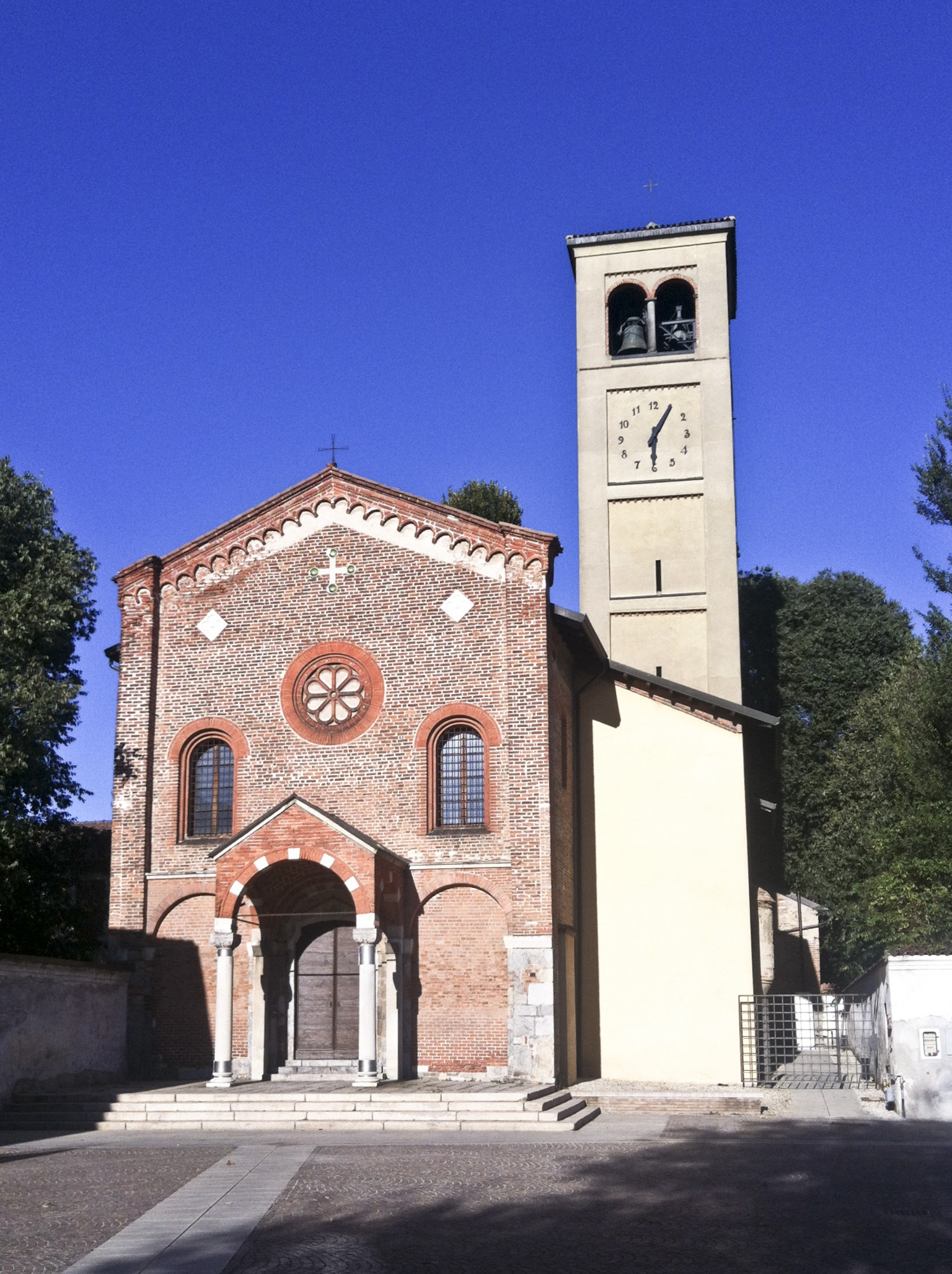 La chiesa romanica di San Pietro all'Olmo, meglio nota come Chiesa Vecchia.